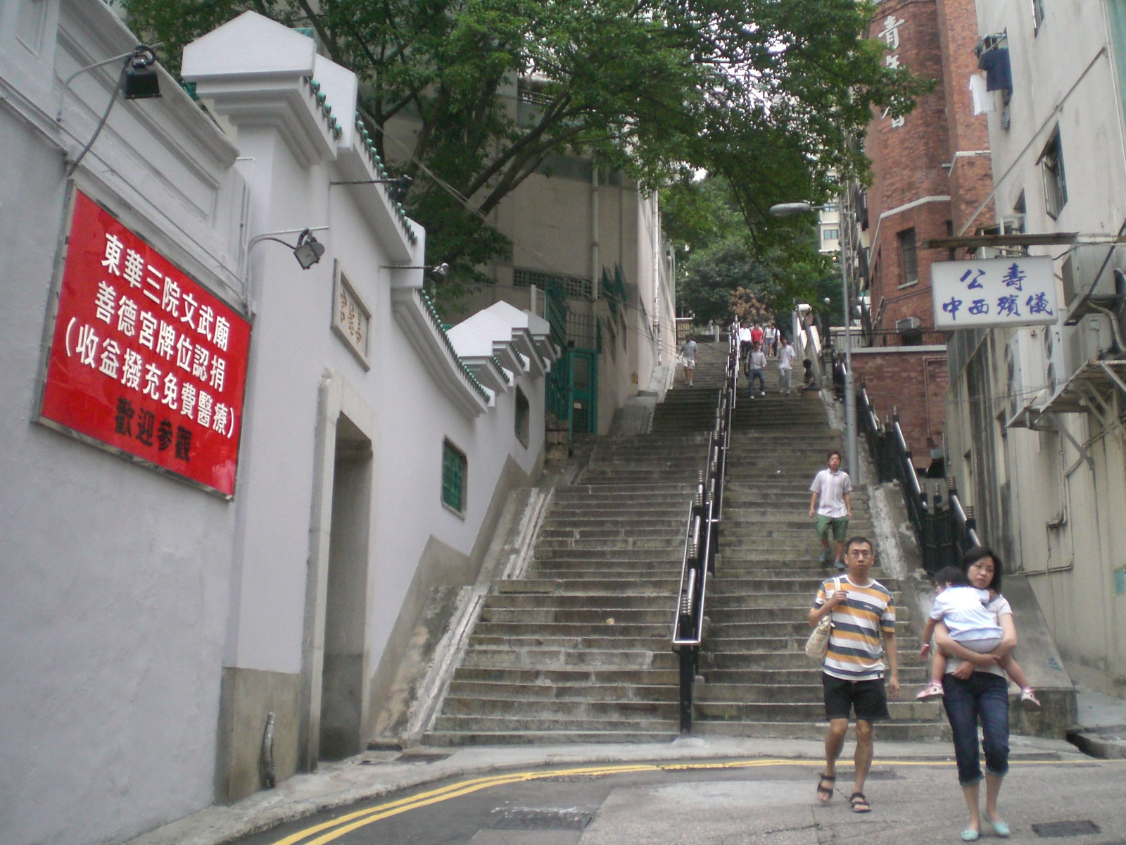 上環東華三院文武廟近樓梯街